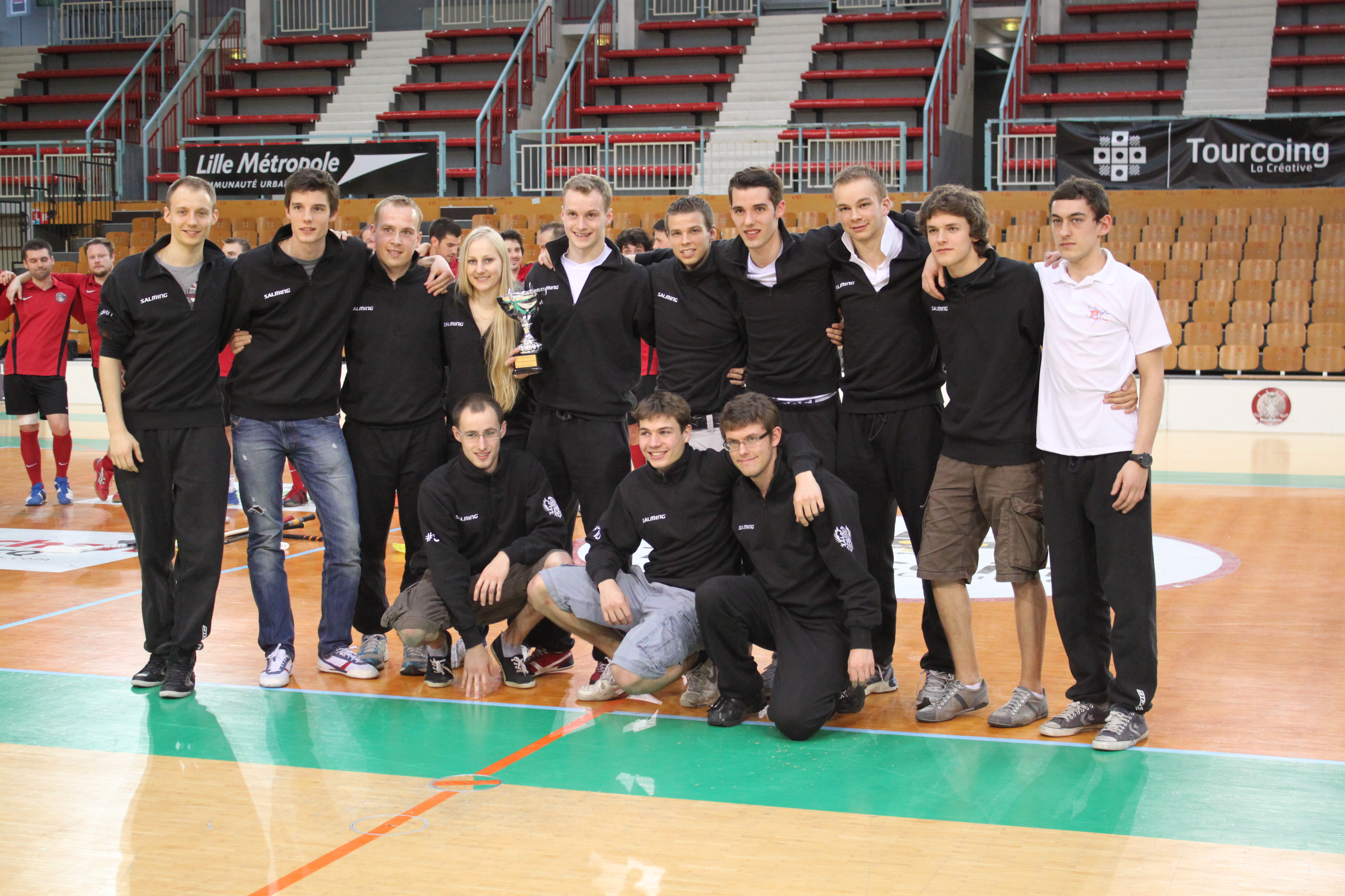 Les Phoenix de Wasquehal aux playoff de la saison 2011-2012 à Tourcoing avec la Coupe du Championnat de France de Division 2.